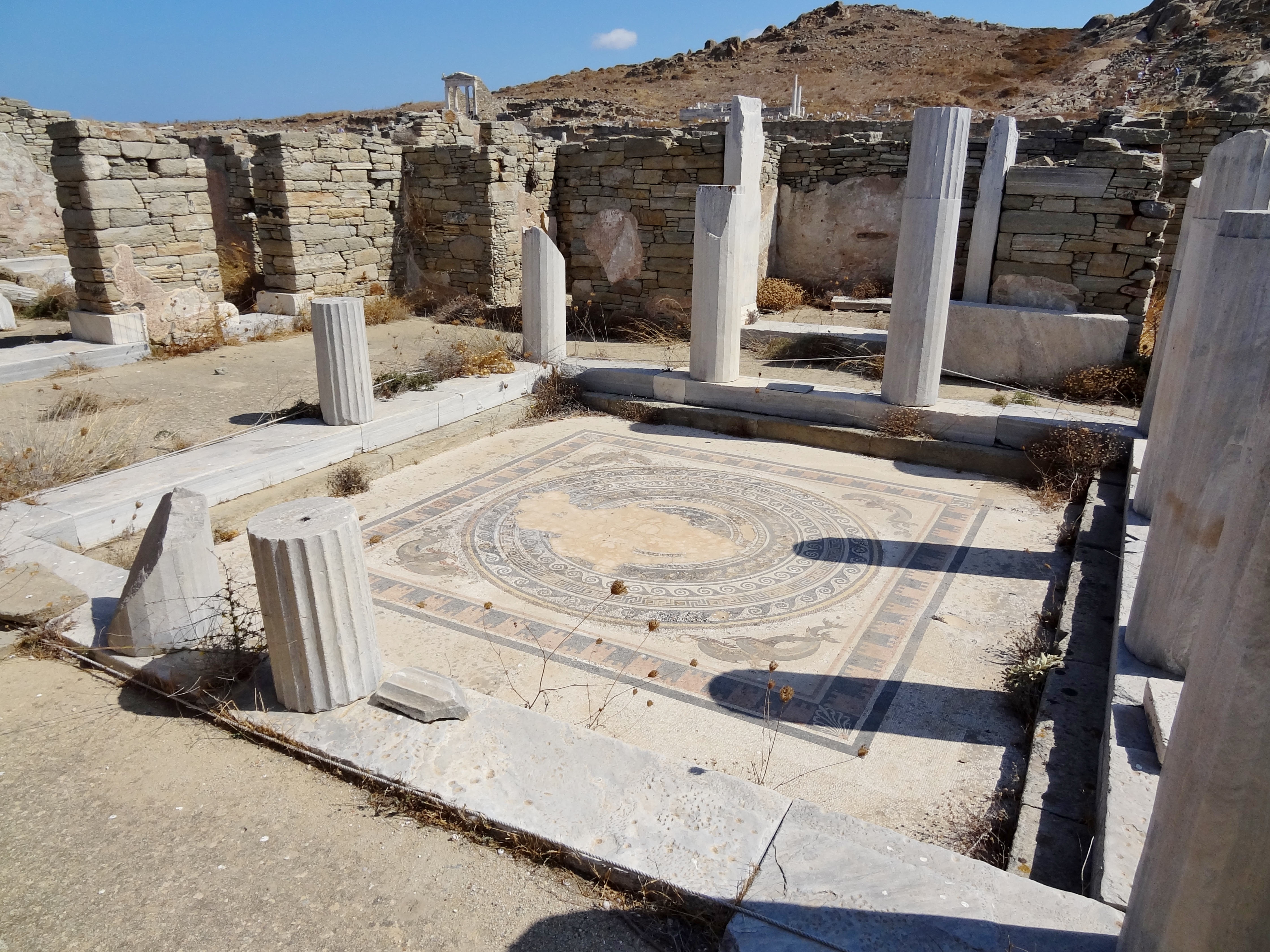 Haus der Delfine auf Delos, Kykladen, Griechenland